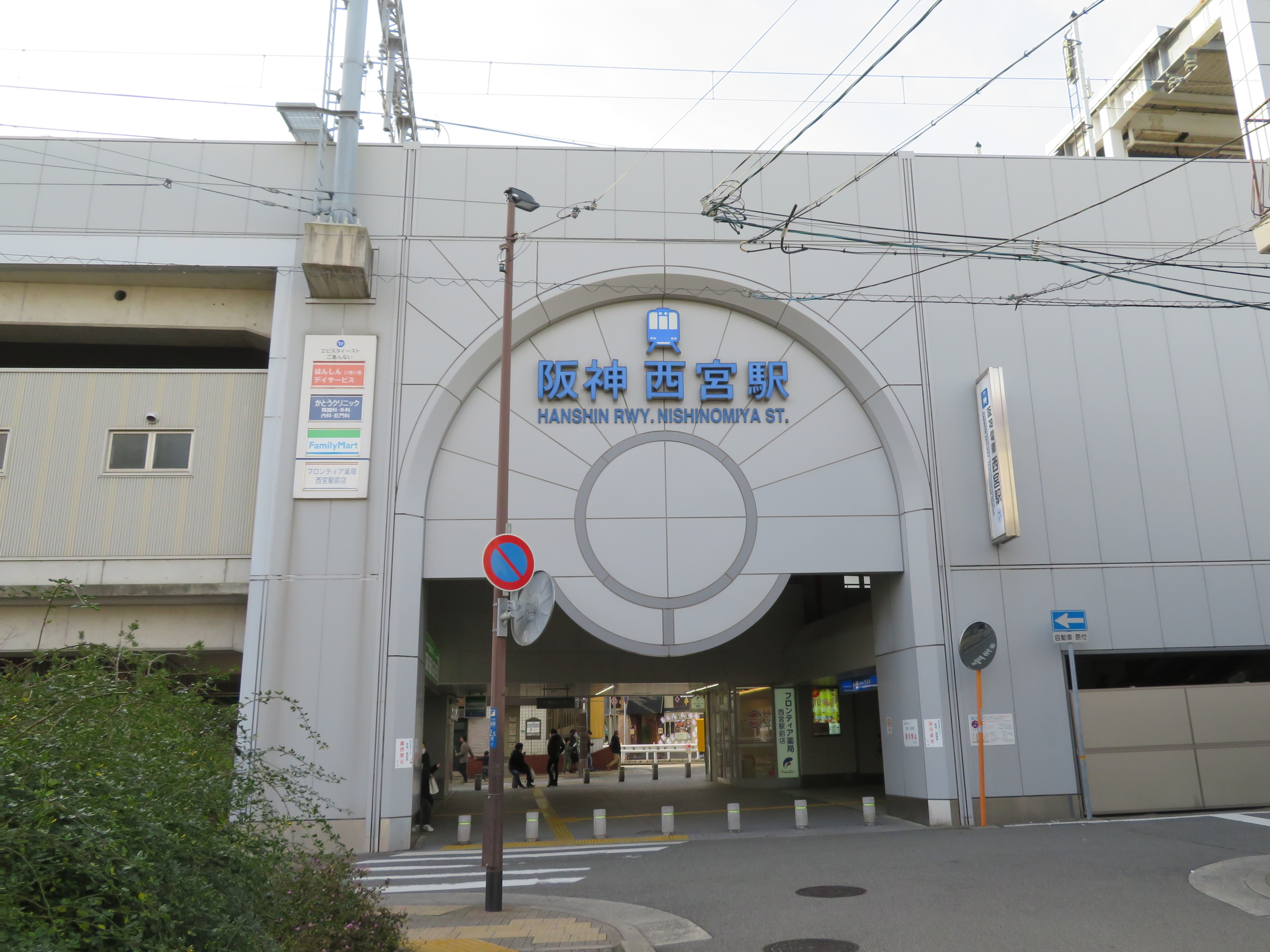 阪神西宮駅東口